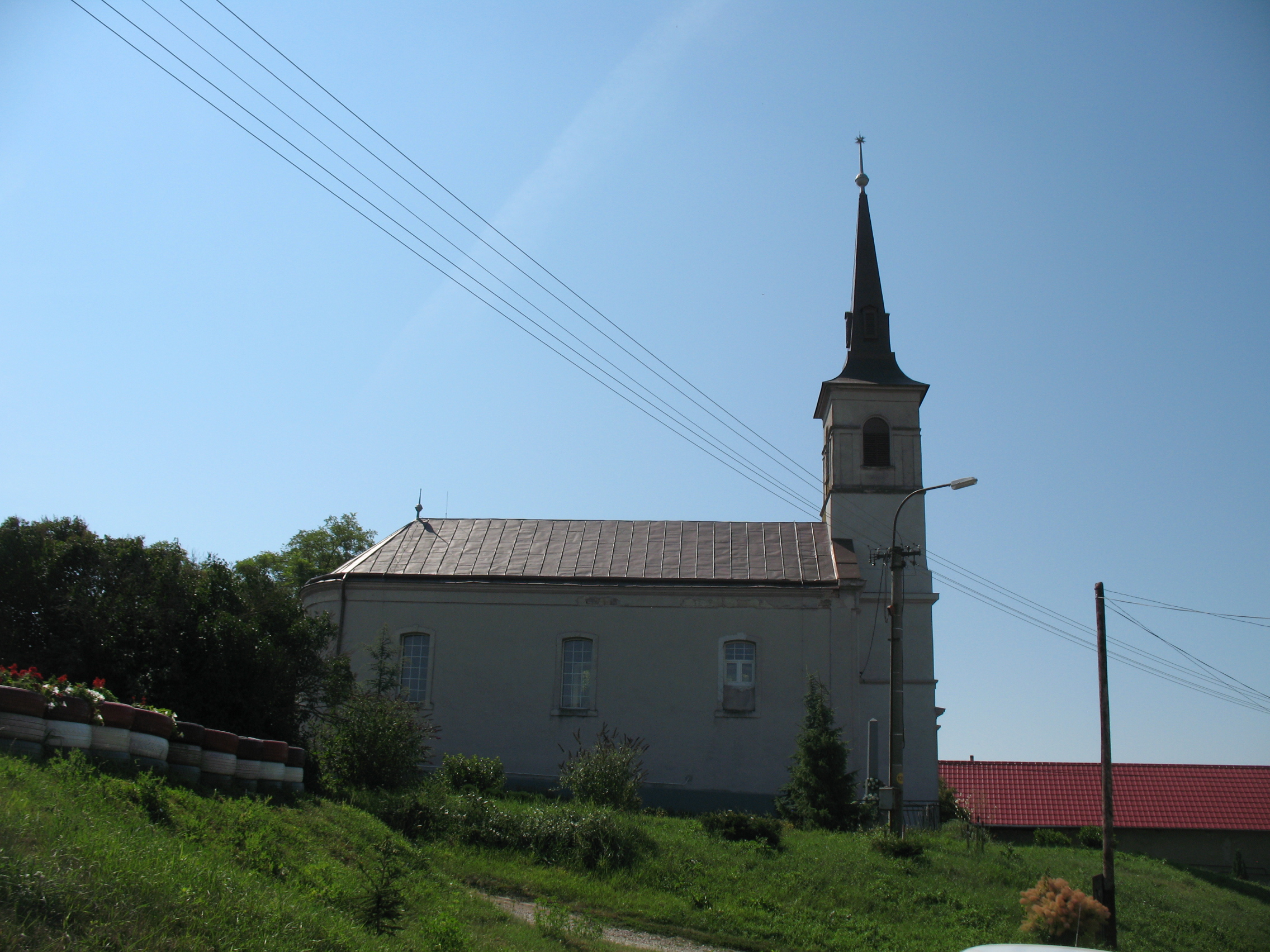 Kétfegyvernek